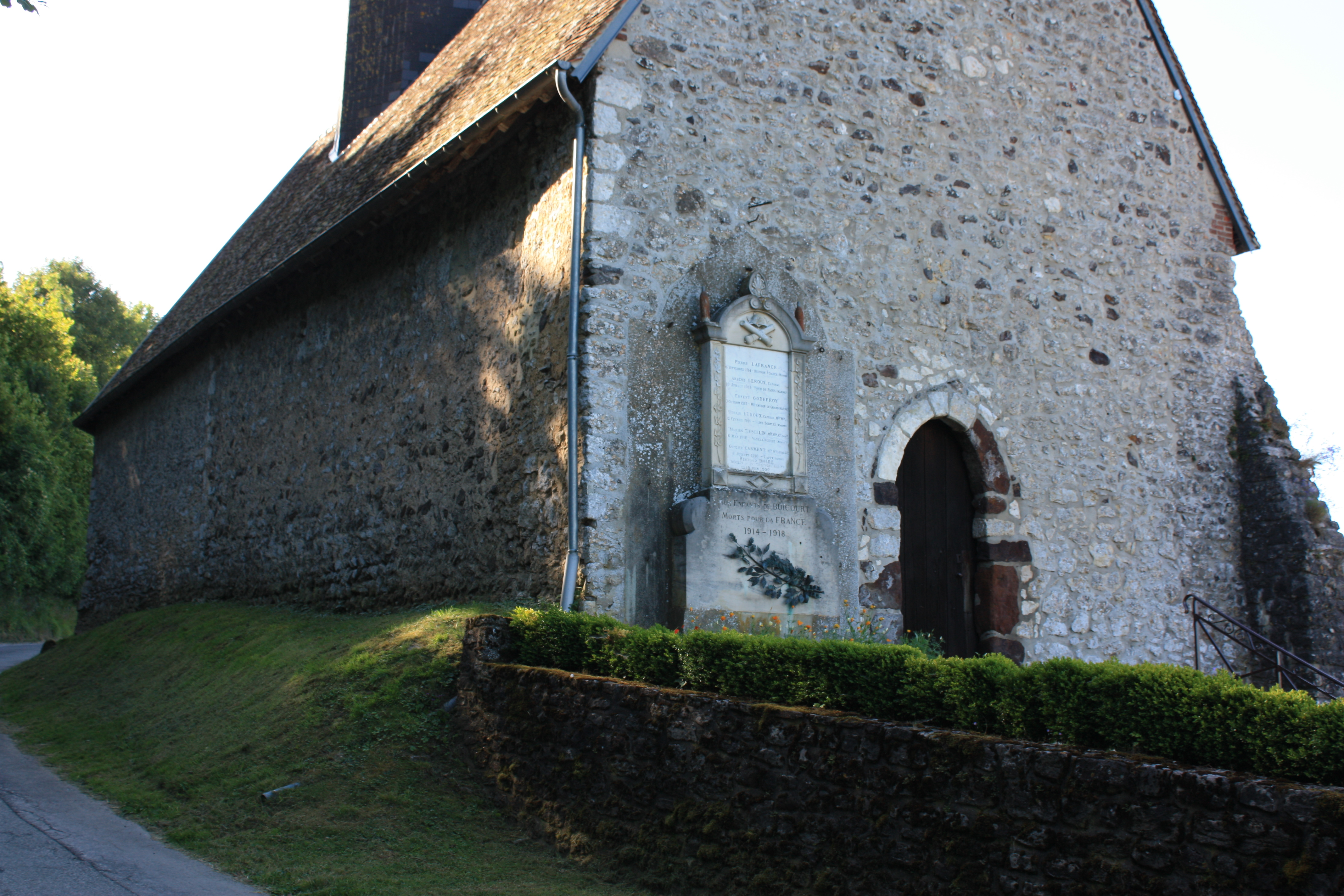 Buicourt - Eglise Saint-Lucien vue de l'angle Nord-Ouest